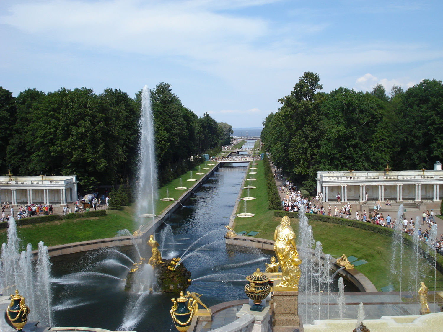 Вид на канал